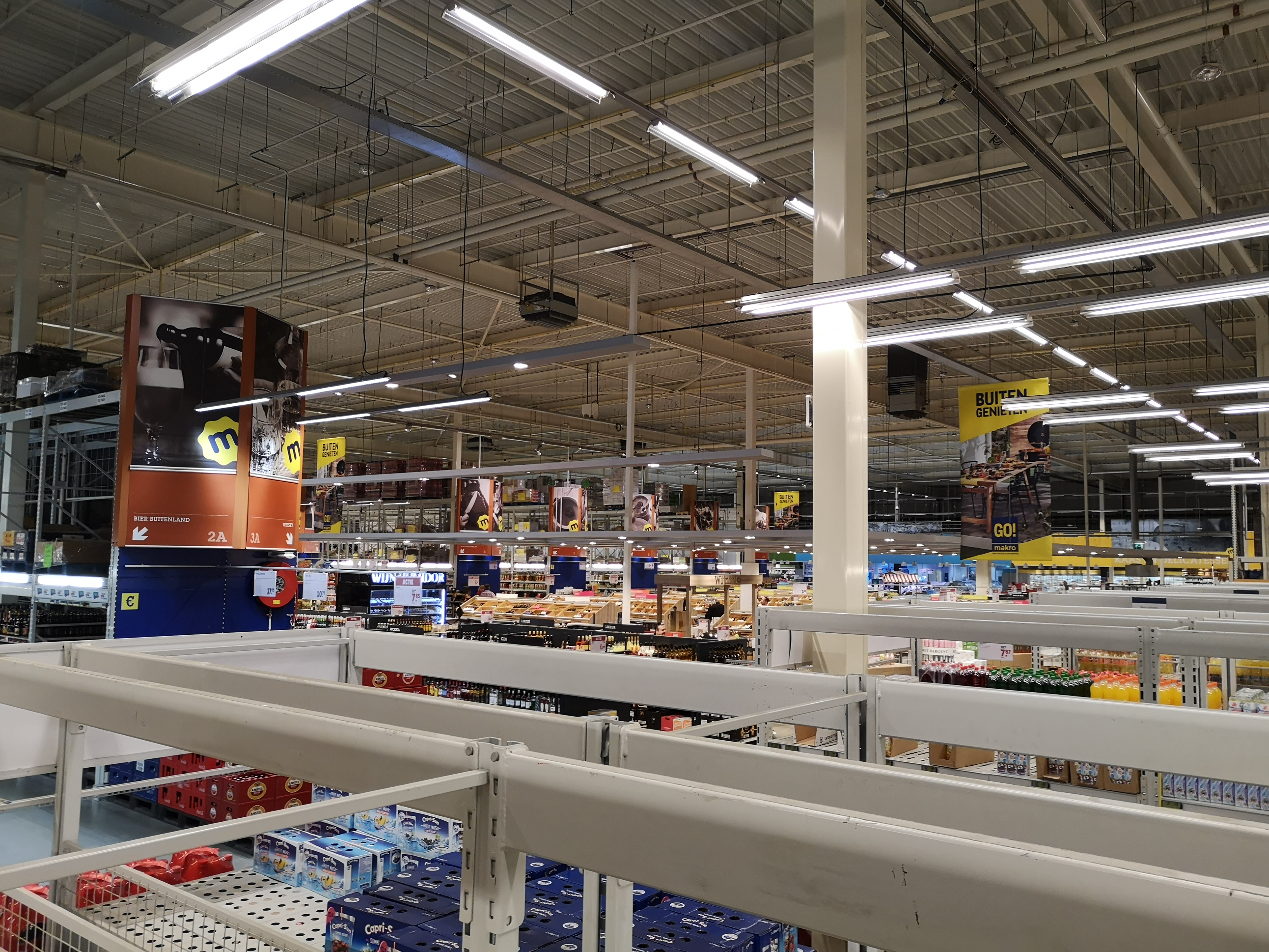 Binnenkant van de Groothandel Makro gevestigd in Groningen